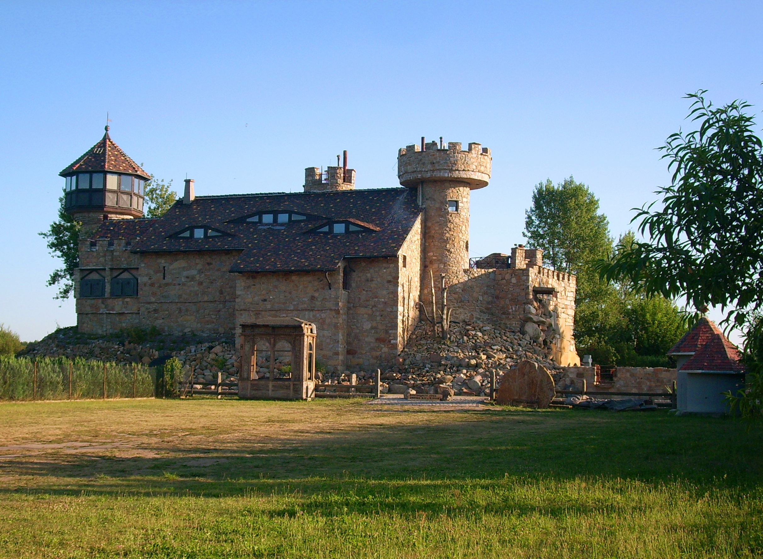 neu erbaute und 2012 eröffnete Burg in Mortka, Ortsteil von Lohsa